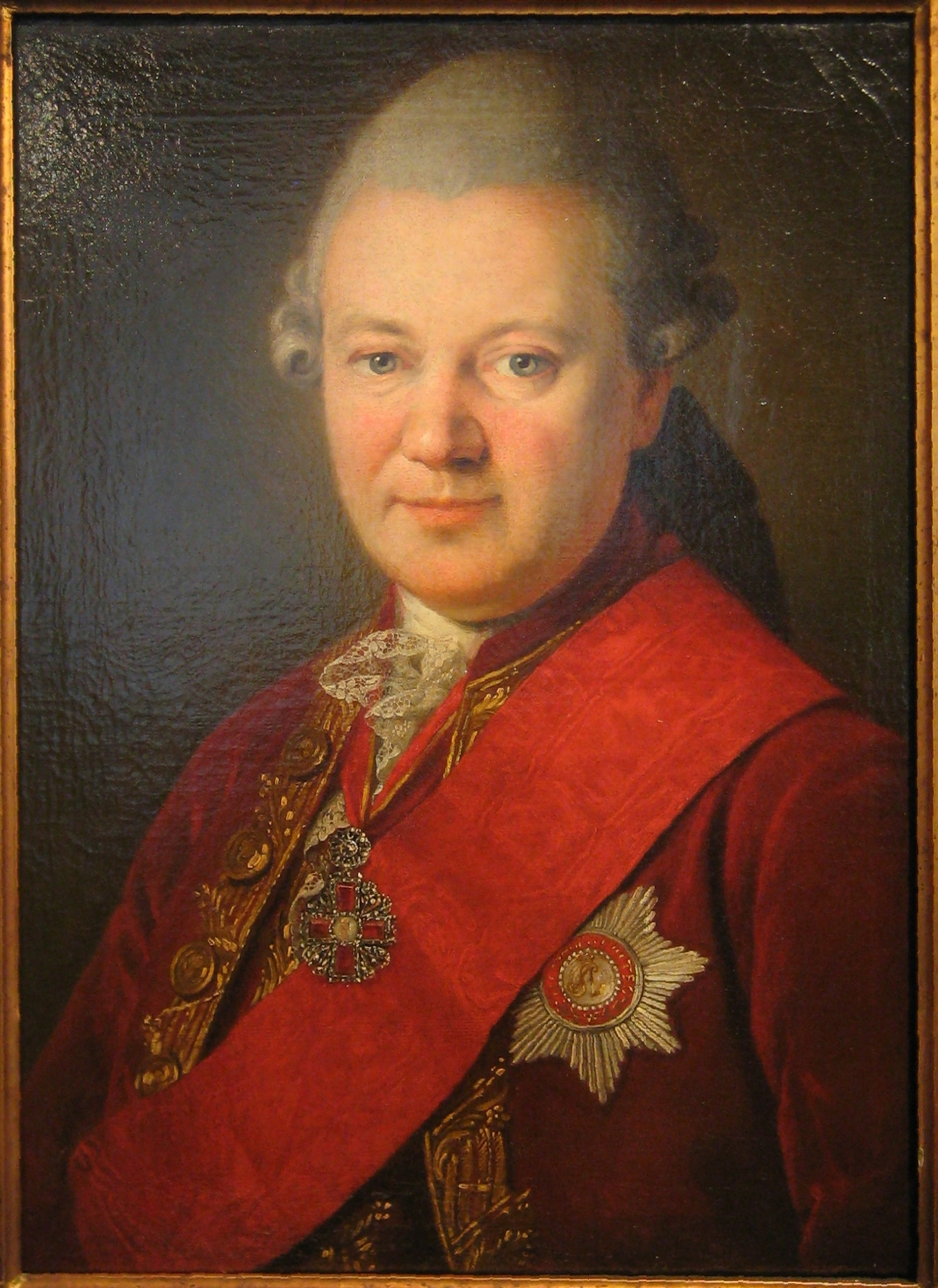 Карл Людвиг Иоганн Христинек. Портрет Ивана Козлова (1716-88). Холст, масло. Музей Тропинина. 1788 (год смерти портретируемого; не исключено, что портрет заказан родственниками как посмертный )